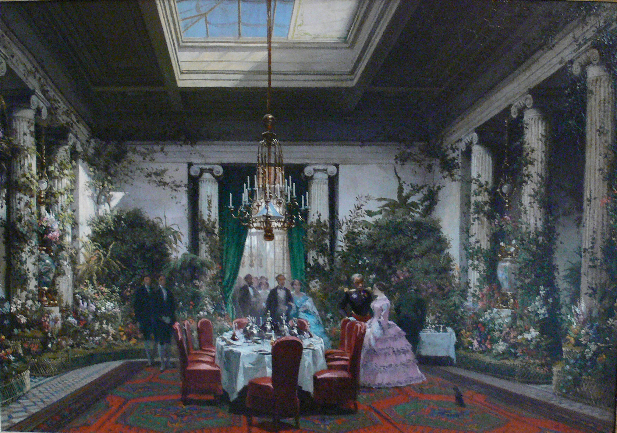 Compiègne, France: Château de Compiègne; Musée du Second Empire: Charles Giraud: Le salle-à-manger de la princesse Mathilde, rue de Courcelles, 1854